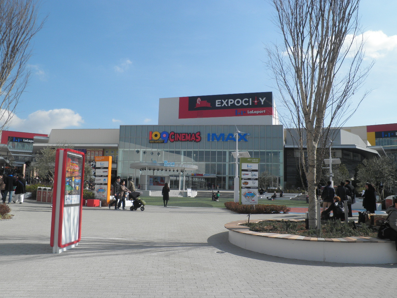 EXPOCITY